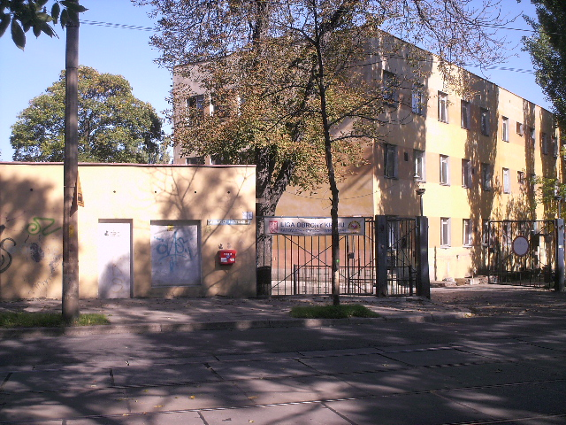 Gliwice - dawne koszary WOP, widok od ulicy Daszyńskiego